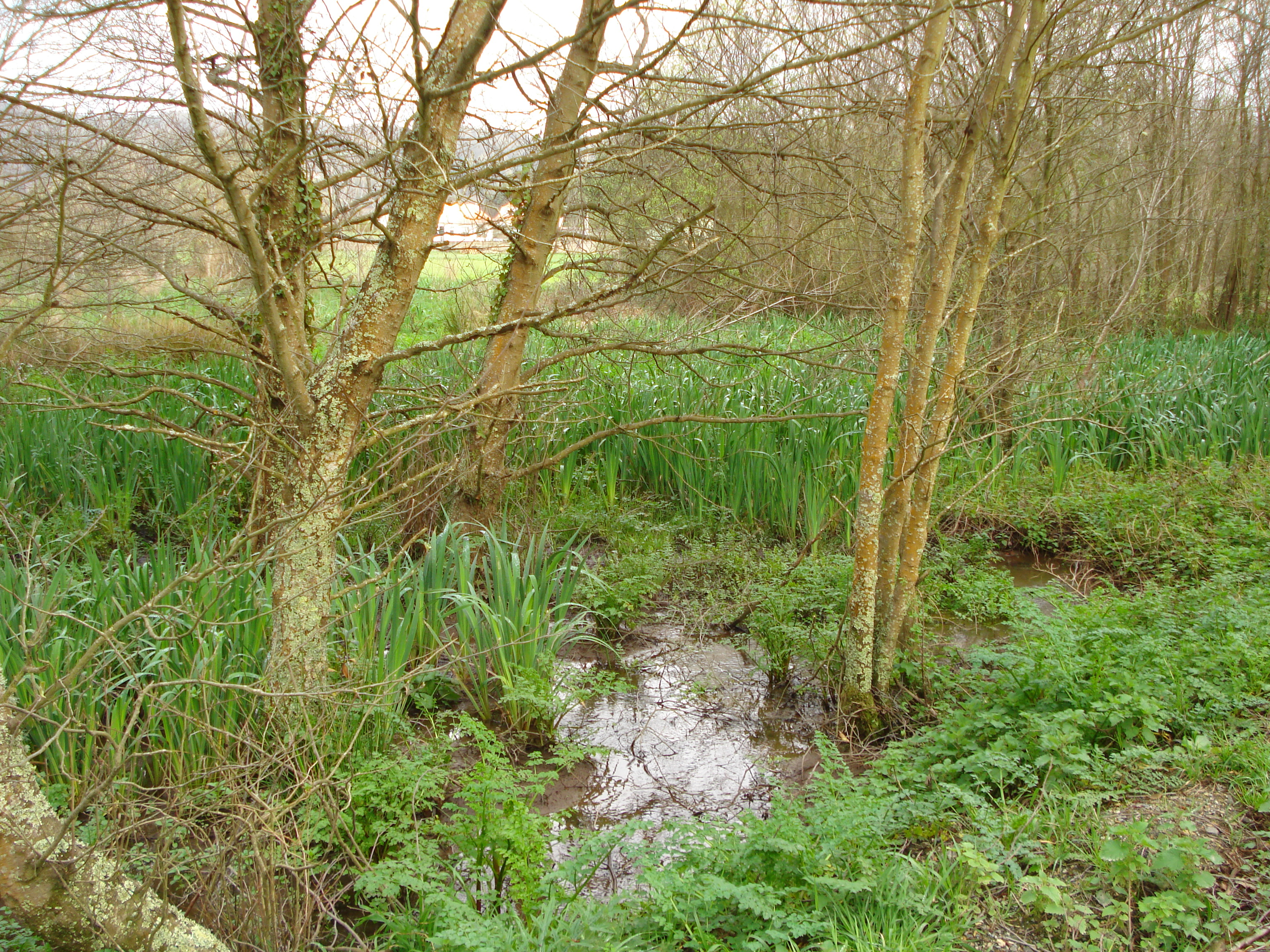 Lagoa da Frouxeira. Zona pantanosa em torno da Lagoa